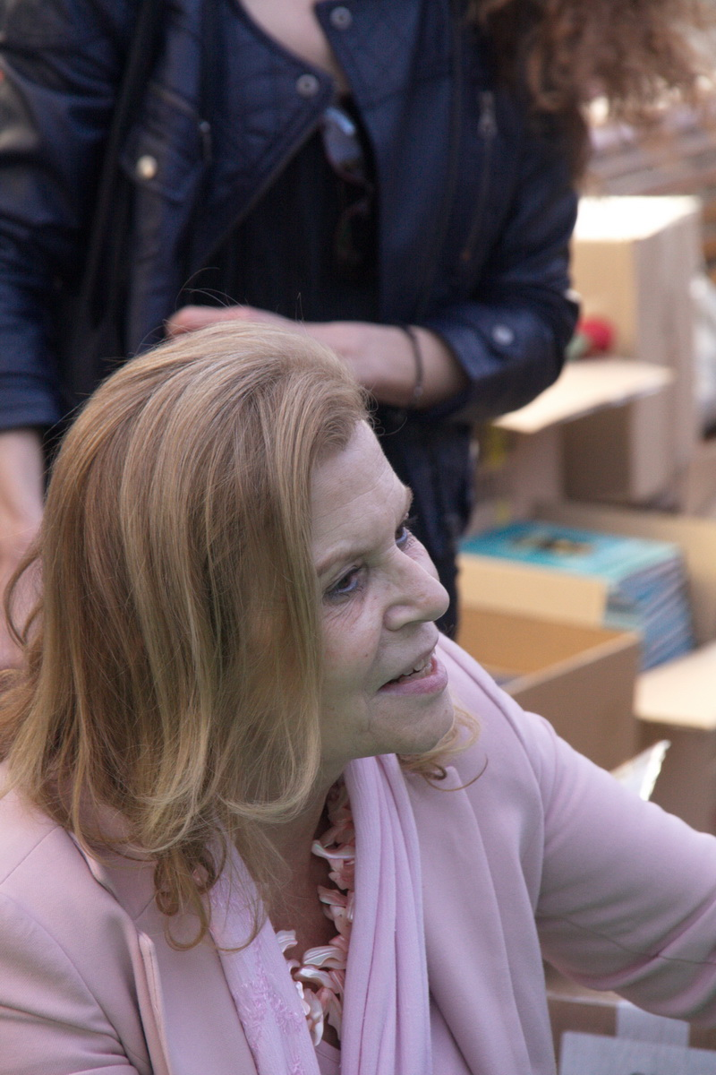 Signatura de llibres en la Diada de Sant Jordi-2015 a Barcelona